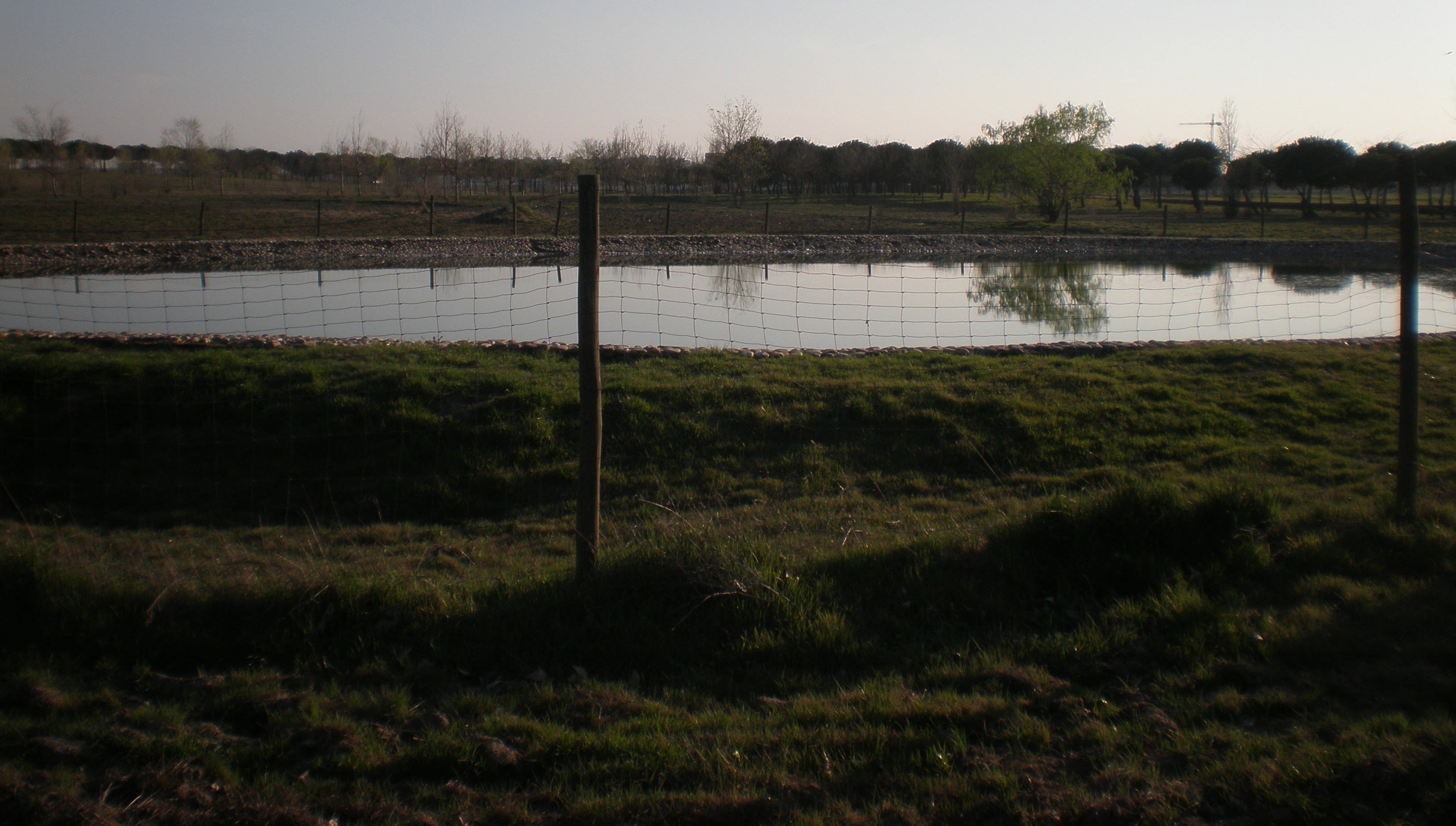 Laguna de los Sisones - Parque de Polvoranca - Madrid - España